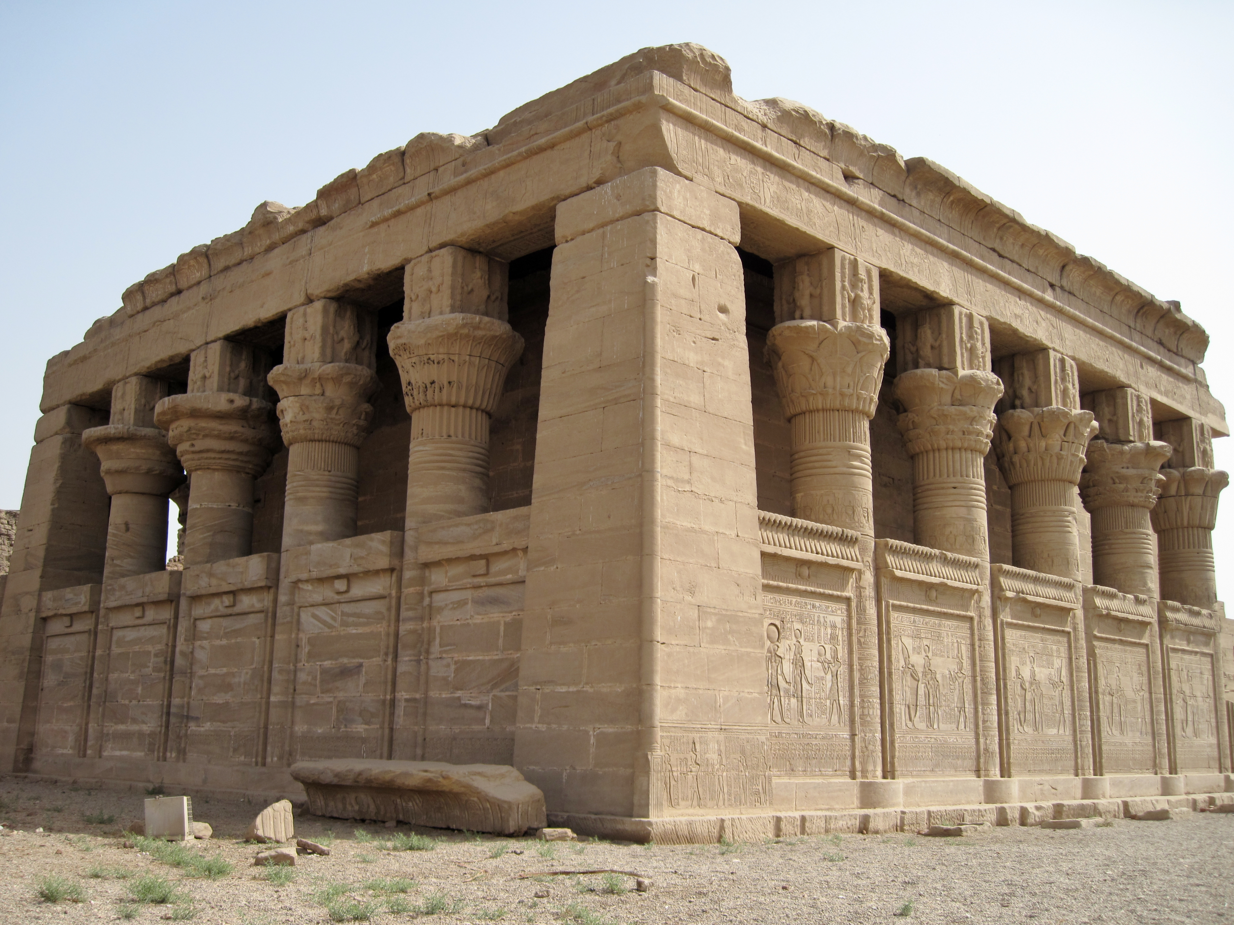 Römisches Mammisi im Tempelkomplex von Dendera, Ägypten